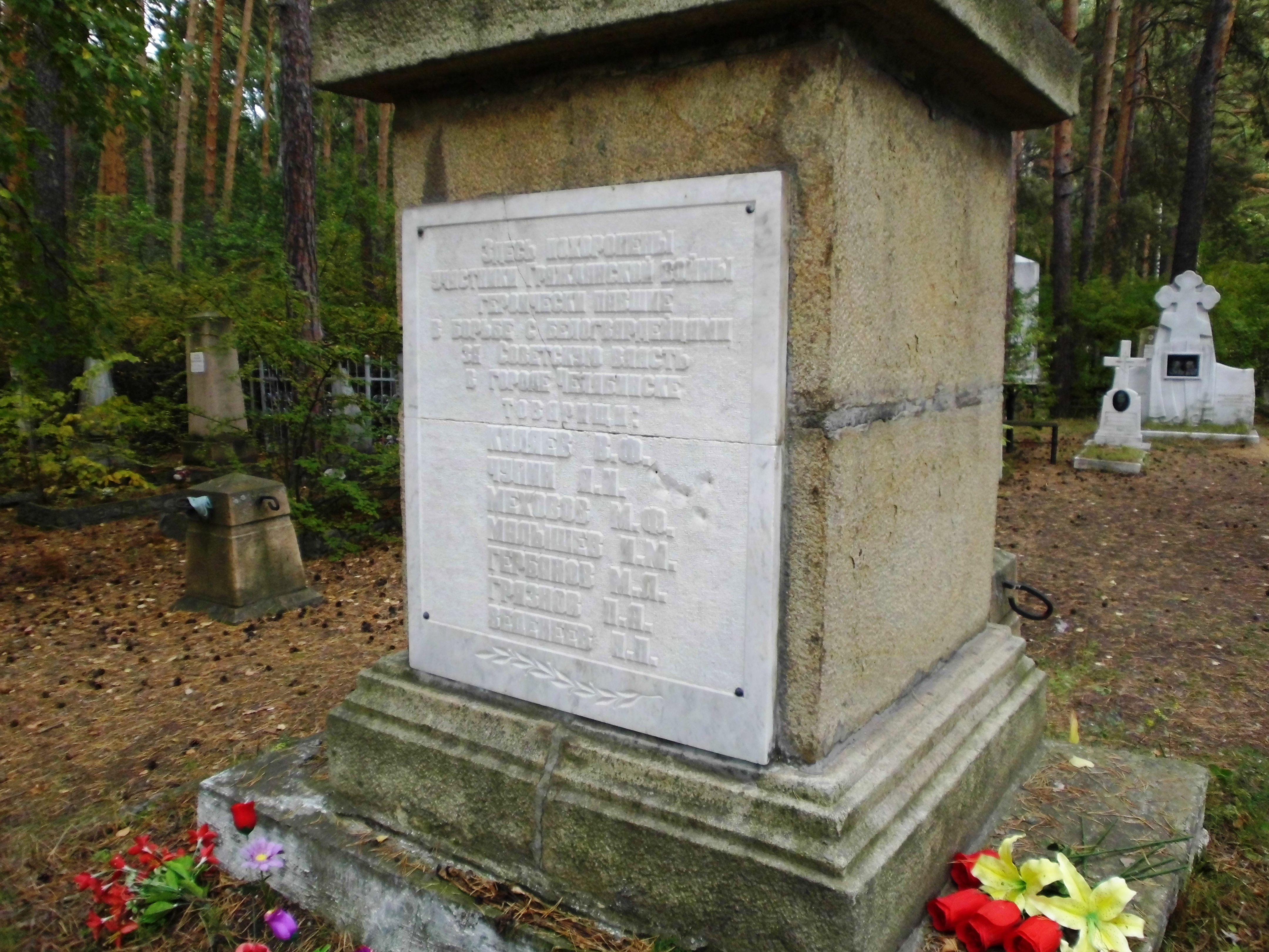 Братская могила участников гражданской войны героический павших в борьбе с белогвардейцами за Советскую власть в городе Челябинске: Каляев В. Ф., Чупин Я. М., Меховов М. Ф., Малышев И. М., Гербанов М. Л., Грязнов П. А., Веденеев Н. П. Митрофановское кладбище, Челябинск, Челябинская область. Находится на отдельной ограждённой территории. Плитка с надписью на центральной стеле.